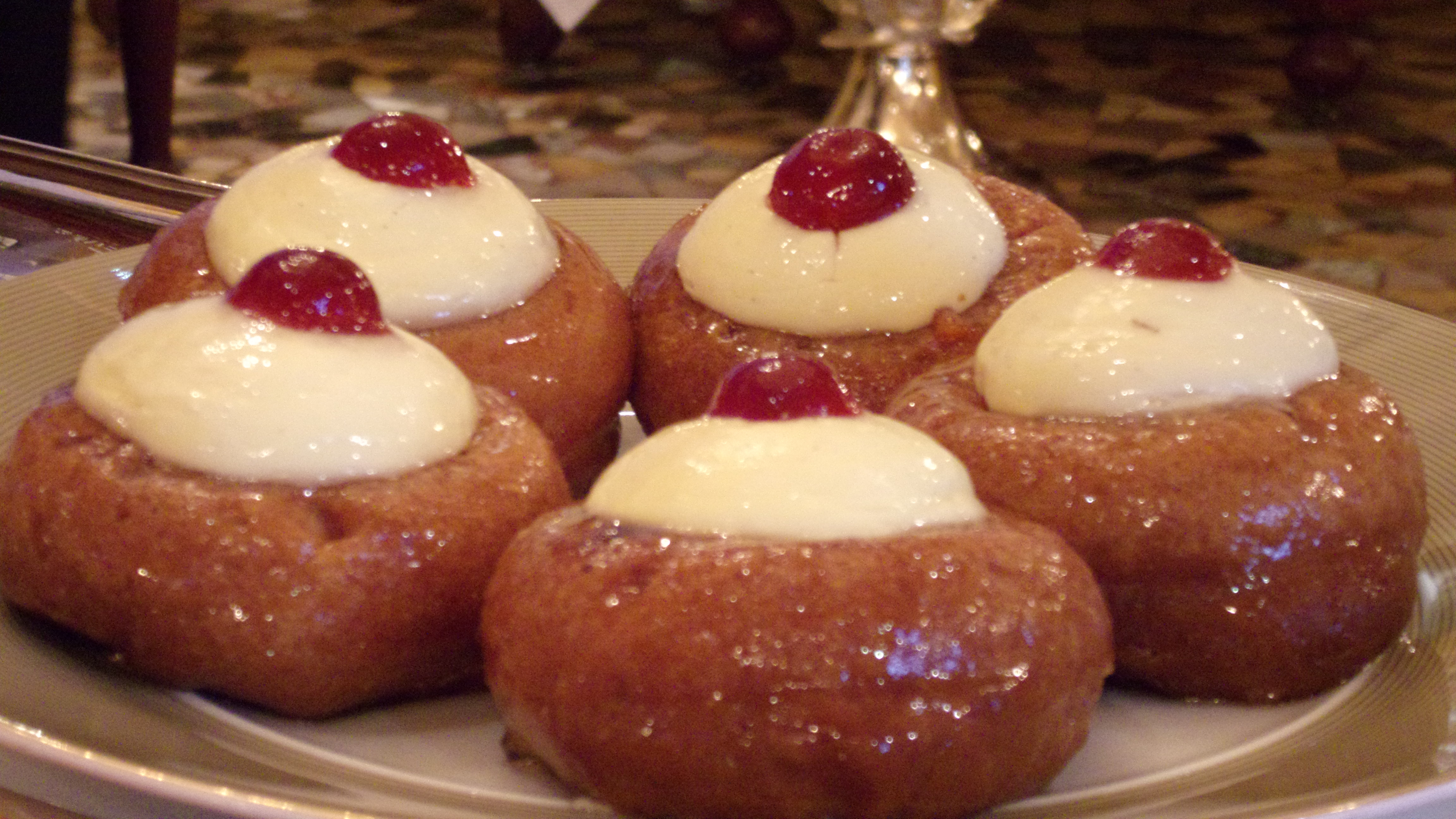 Plusieurs babas au rhum sur une assiette.